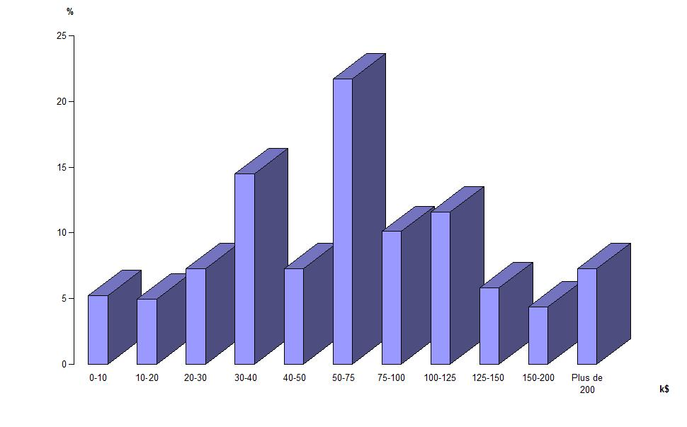 Distribution des revenus de la population de Morrison (Colorado, Etats-Unis) en 2008